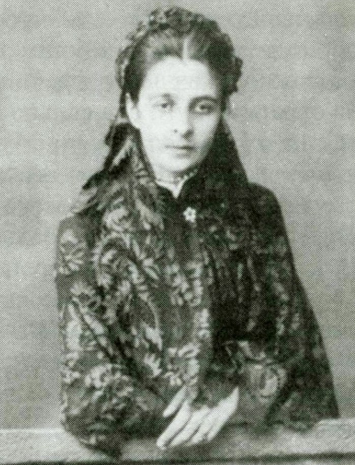 Евгения Александровна Васильчикова (1862—1884), в замужестве Строганова.